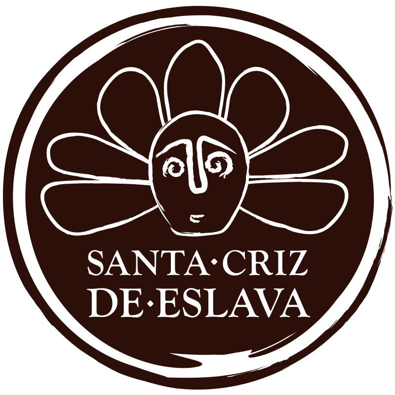 Logo del yacimiento arqueológico de Santa Criz de Eslava